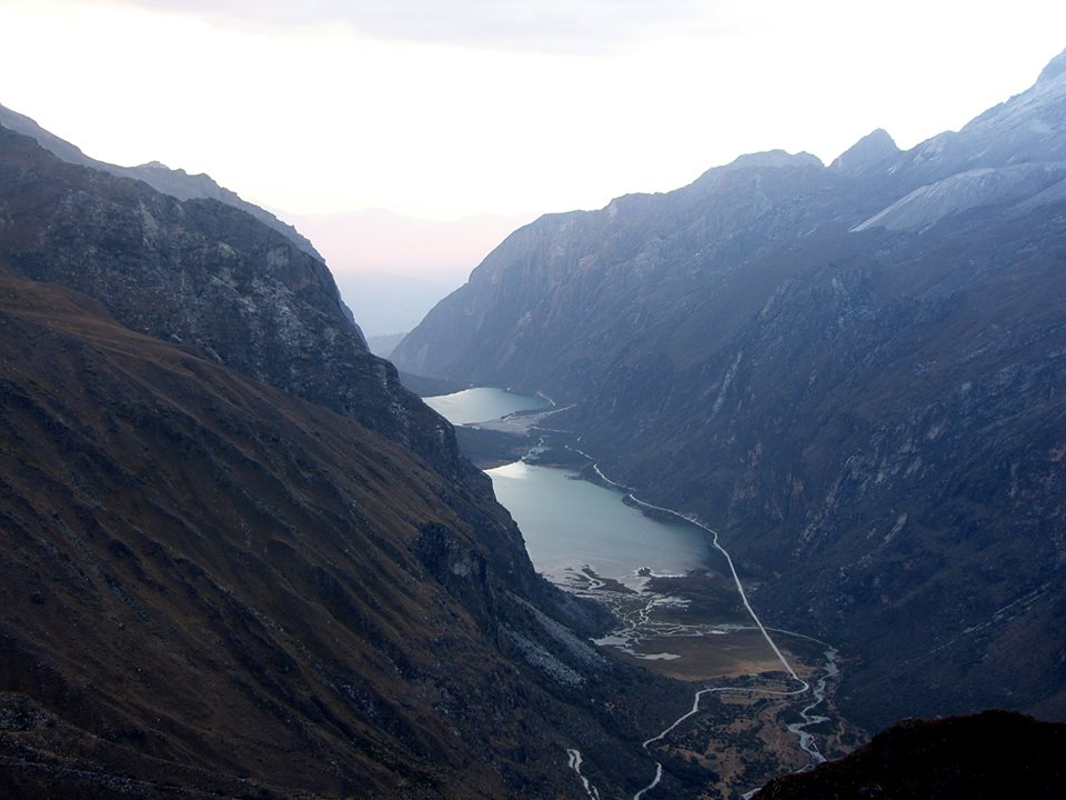 Quebrada de Llanganuco en 2012